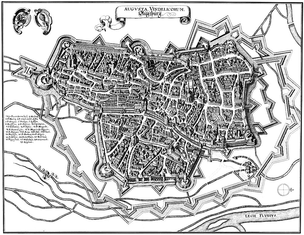 Ansicht von Augsburg im Jahre 1643